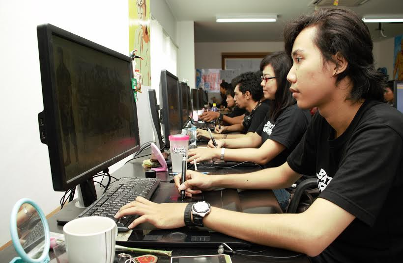 Studio Animasi BoS-MSV Pictures